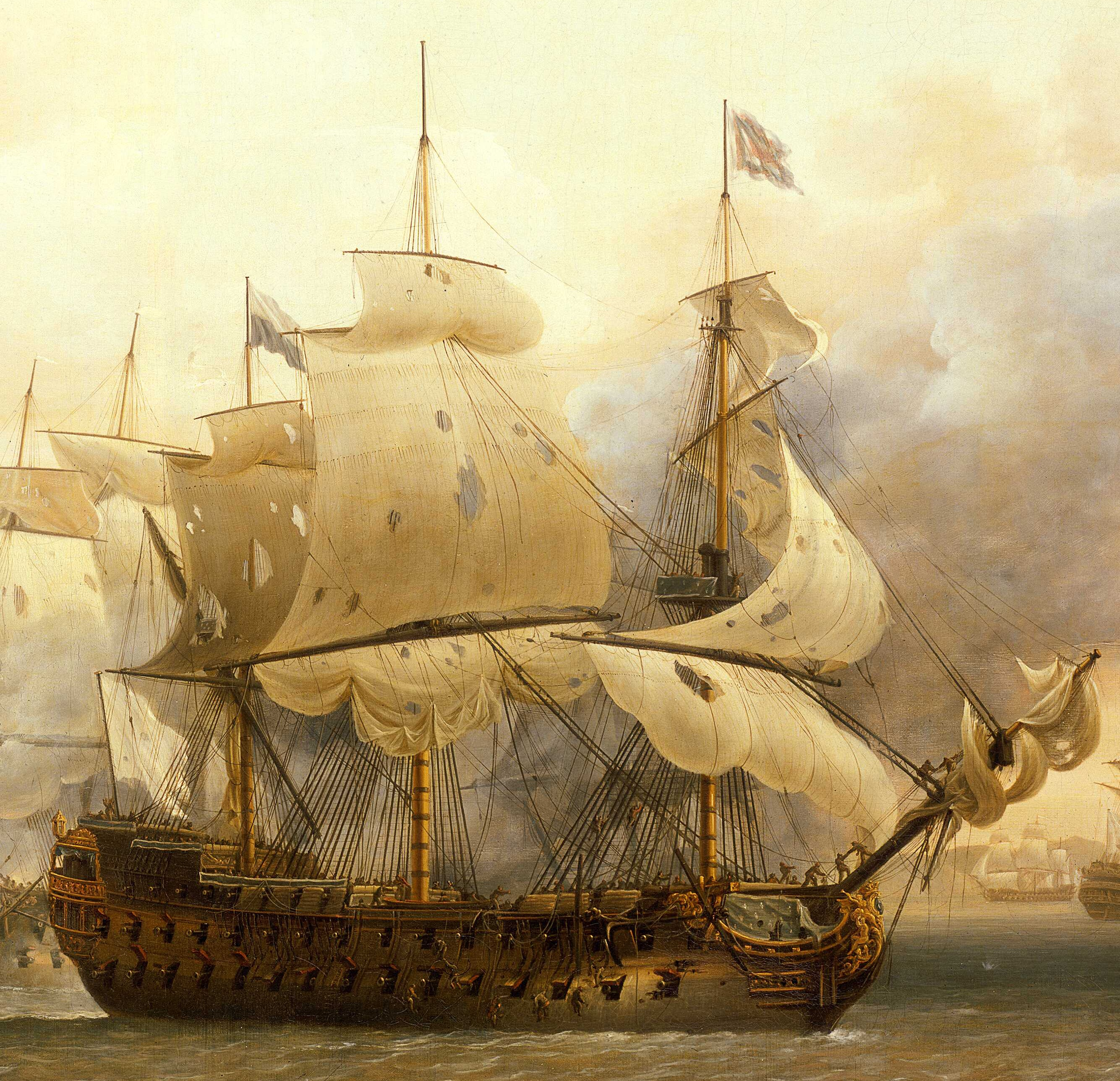 Le vaisseau de ligne français de 80 canons le Saint-Esprit au combat en 1782 (batailles de Saint-Christophe, Antilles). Détail d'un tableau anglais de 1784. (Vaisseau identifié par Rif Winfield et Stephen S. Roberts dans leur ouvrage French Warships in the Age of Sail 1626-1786 : Design, Construction, Careers and Fates, paru en octobre 2017).